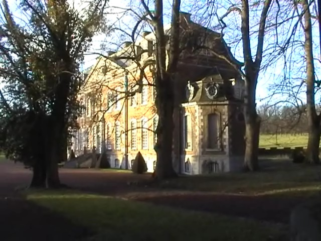 Soiron : le château. C'est au Pays de Herve dans la Province de Liège en Blegique